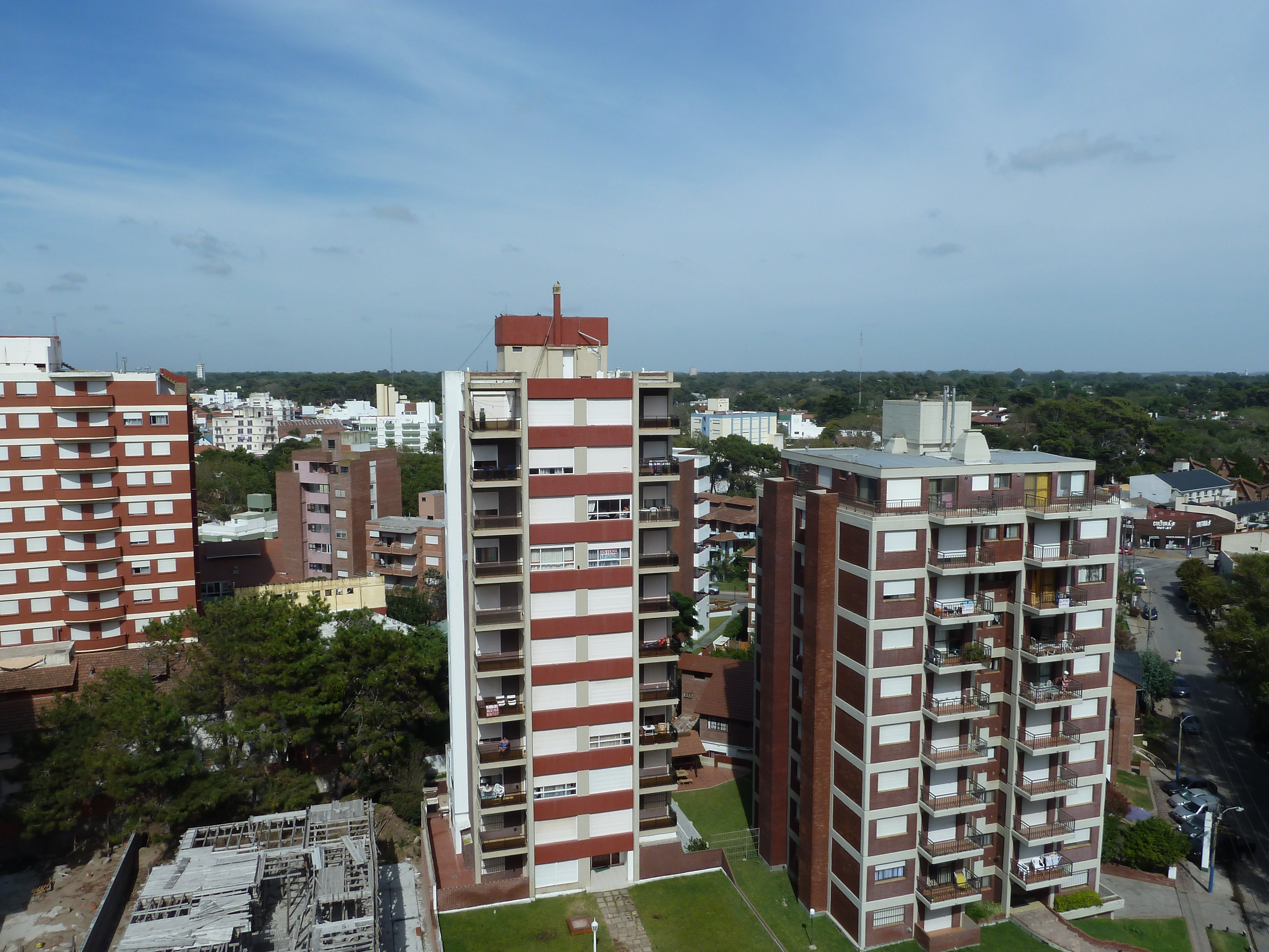 Villa Gesell, Buenos Aires Province, Argentina